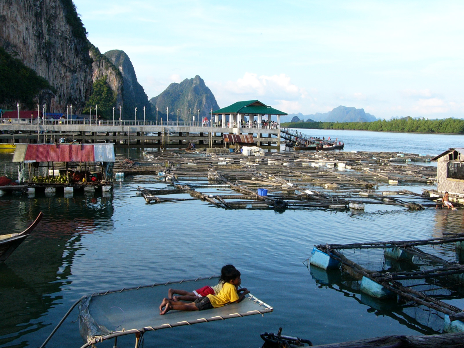 Ko Panyi